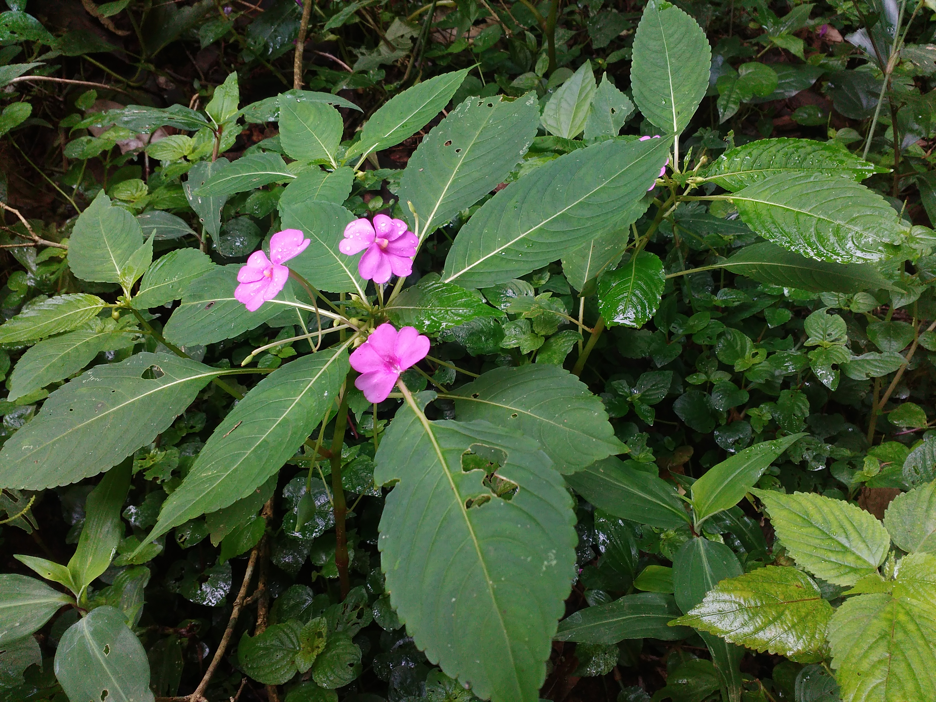 onappoo in the tree. ഇൻപേഷ്യൻസ് ബ്ലാസ്റ്റിഡെ (inpersiance blaastide) Taken from Vellakkat mana